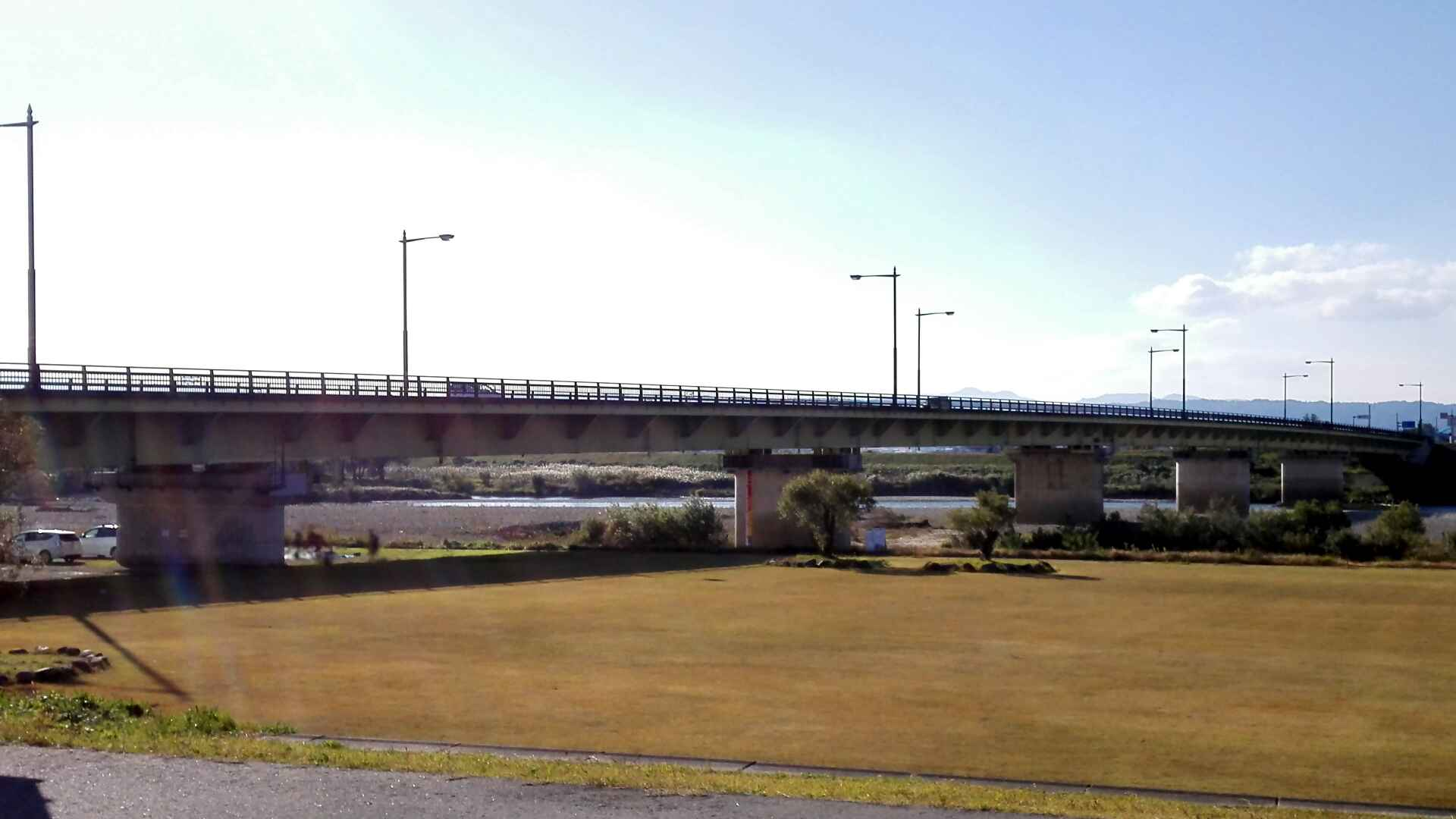 宮古橋（橋の東側より撮影）